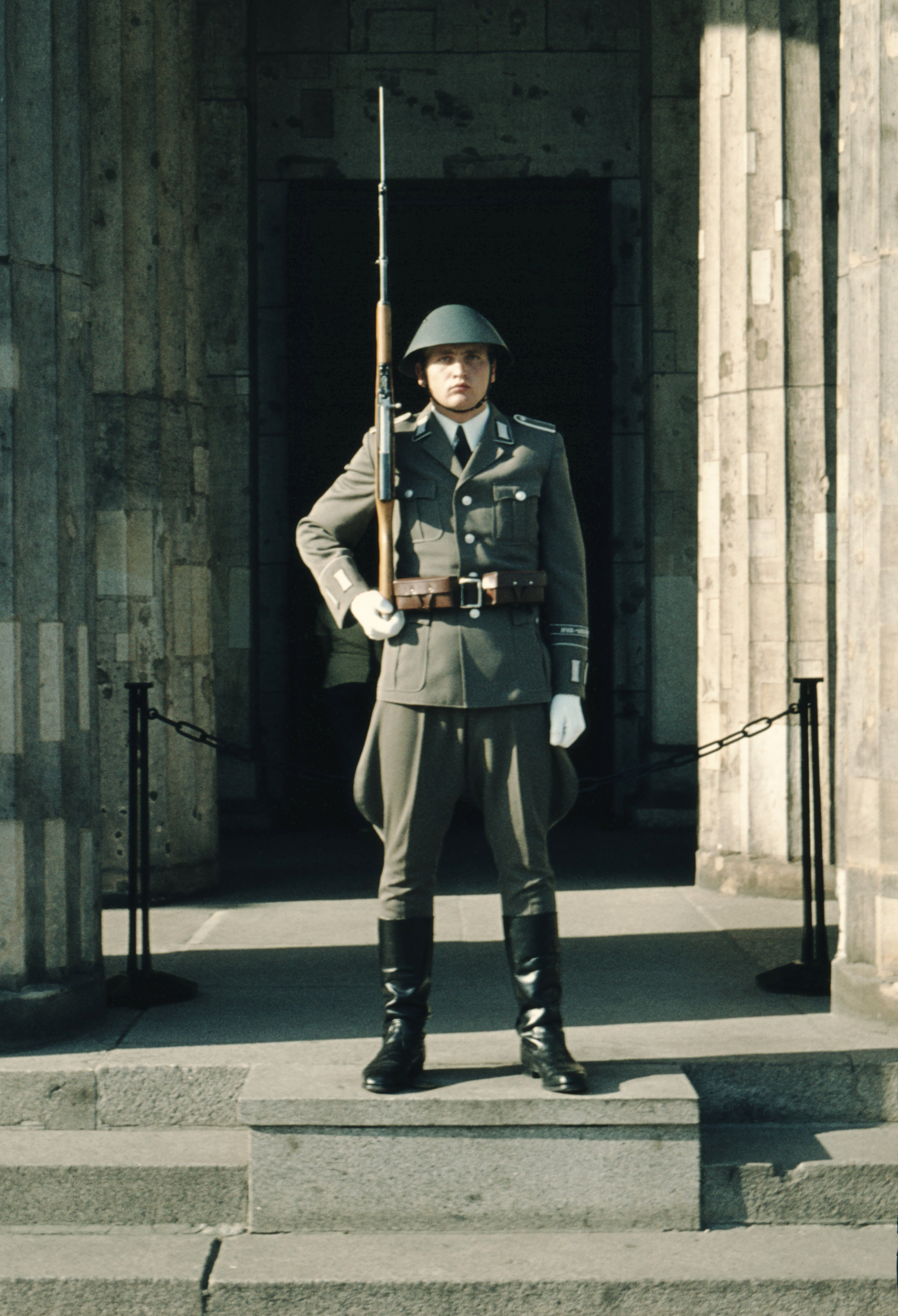 DDR, NVA-Posten in Ostberlin, August 1975, vor dem damaligen "Denkmal für die Opfer des Faschismus", heute wieder 'Neue Wache'